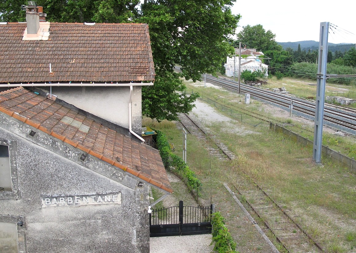 Au premier plan l'ancienne gare de la RDT 13, au fond la gare PLM. Entre elles,la ligne Avignon - Arles.